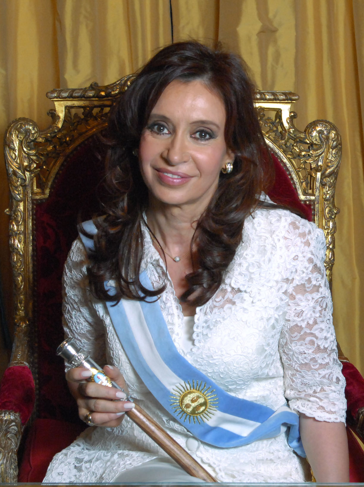 Cristina Fernandez de Kirchner - Prezydent Argentyny